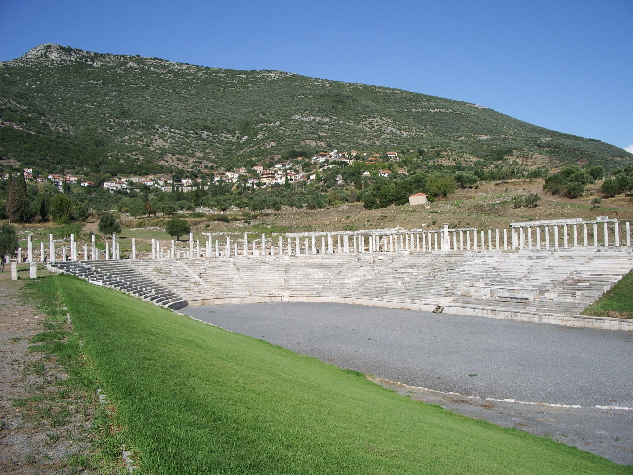 Stadion im antiken Messene Nach Restaurierung